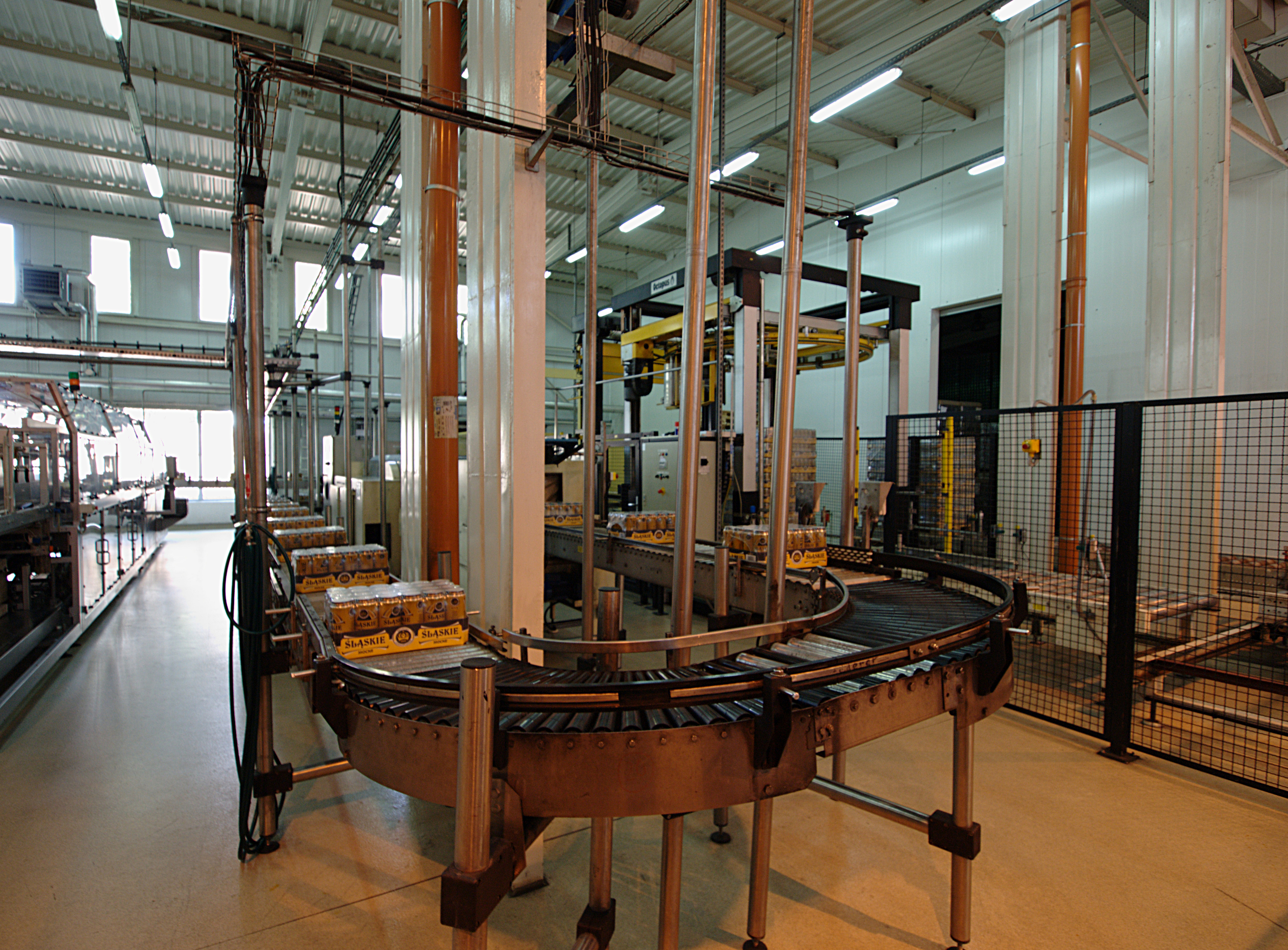 Browary Górnośląskie w Zabrzu. Rozlewnia piwa puszkowego.